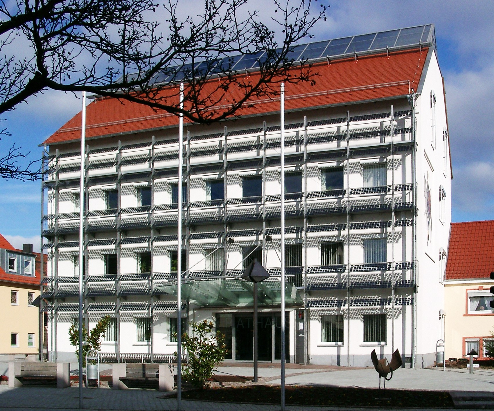 Rathaus von Edingen-Neckarhausen nach dem Umbau